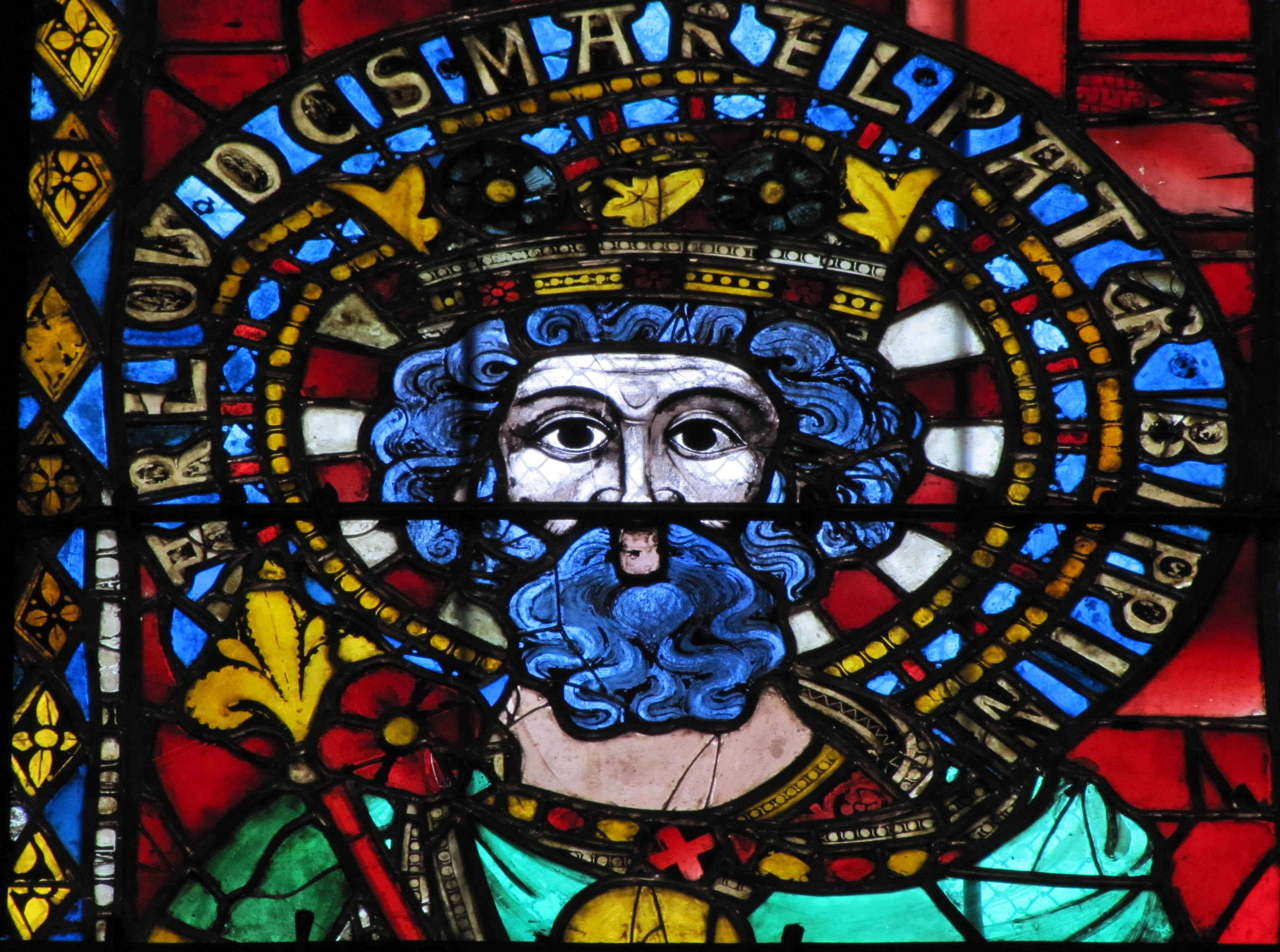 Alsace, Bas-Rhin, Cathédrale Notre-Dame de Strasbourg (PA00085015). Bas-côté nord, Verrière (1210-1270) "Empereurs Saint-Empire": Charles Martel, grand-père de Charlemagne